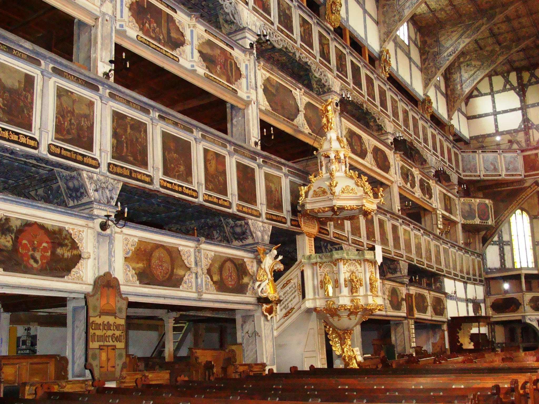 Jawor, kościół ewangelicki (Pokoju), 1654-1656, 1709